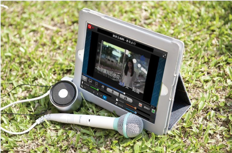 台灣地區的ktv app